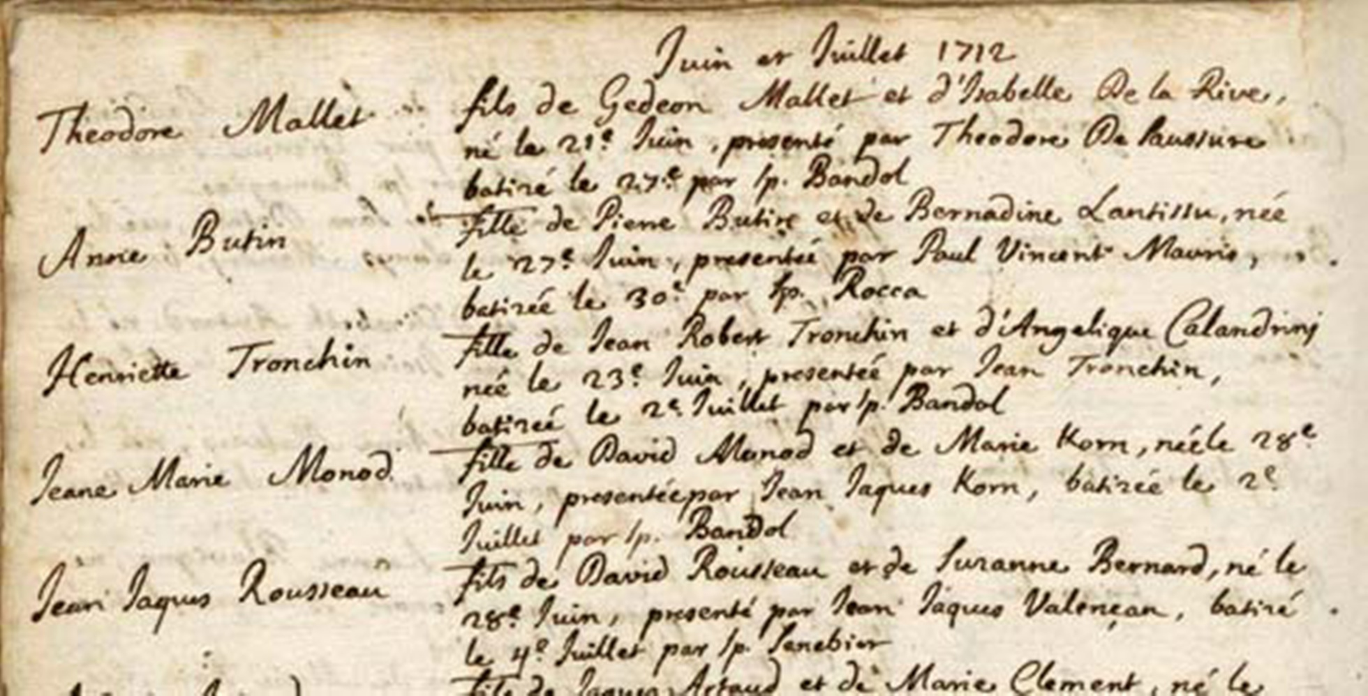 Acte de baptême de Jean-Jacques Rousseau, le 4 juillet 1712 à la cathédrale Saint-Pierre de Genève. Document AEG, cote archive : E.C. Saint-Pierre BM 11.